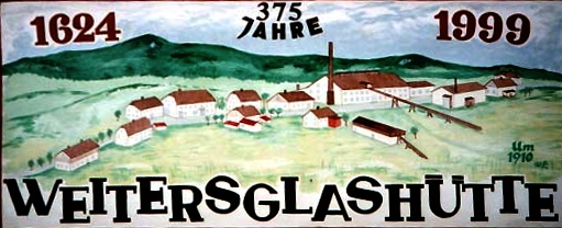 Ansicht von Weitersglashütte um 1910, gemalt aus Anlass der 375-Jahrfeier